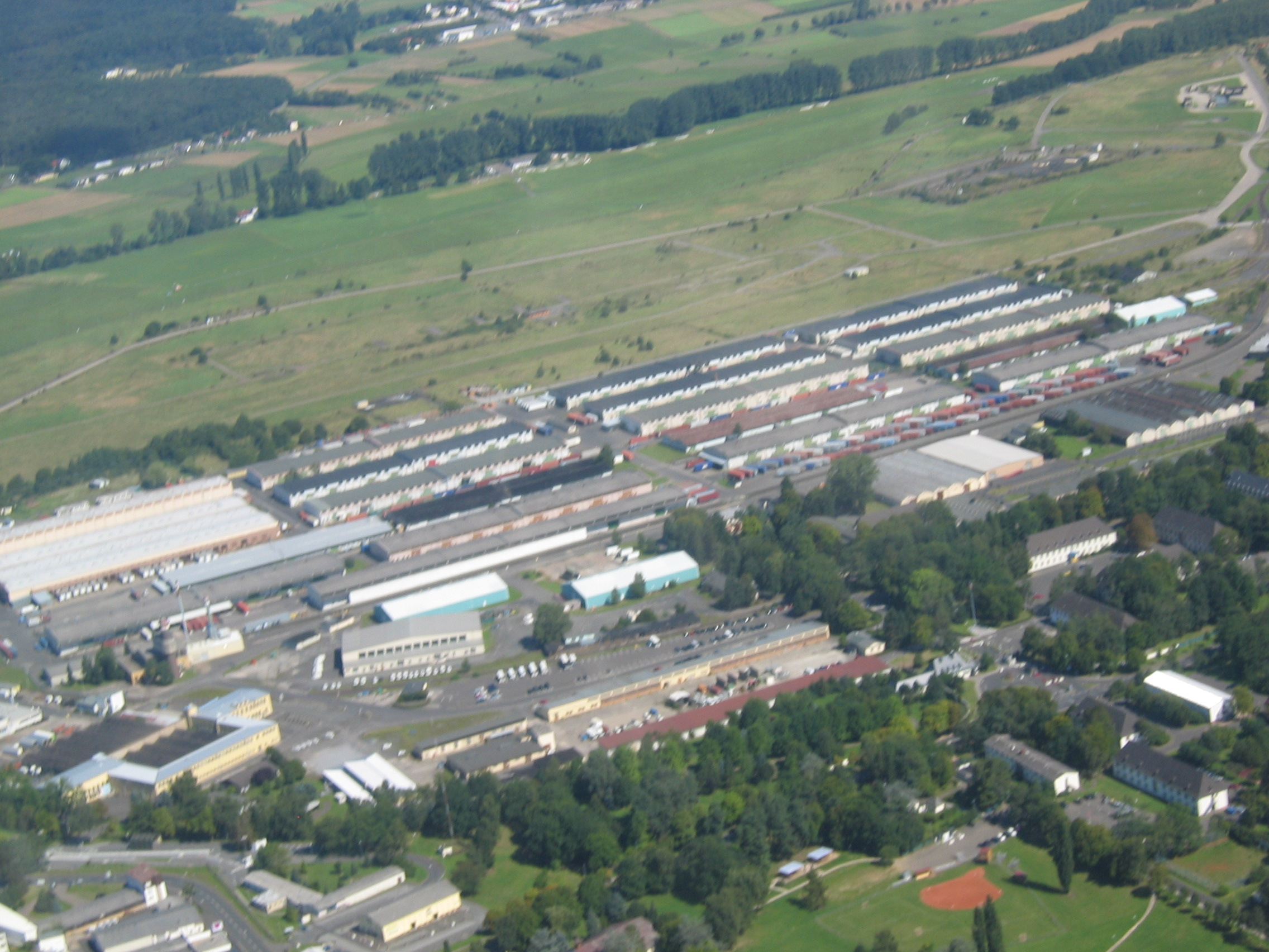 Luftaufnahme des US-Depot in Gießen. Aufgenommen am 28.08.2005 aus etwa 100 m Höhe.